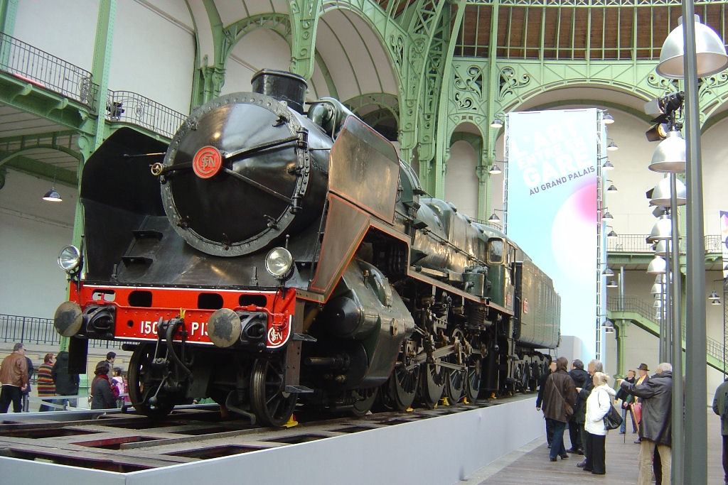 Locomotive 150 P 13 de la SNCF exposee au Grand Palais a Paris